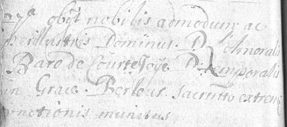 Obiit nobilis admodium ac illisible Dominus D L'Amoral Baro de Courtejoye D temporatis in Grace-Berleur sacrinto extremi illisible nunibus.